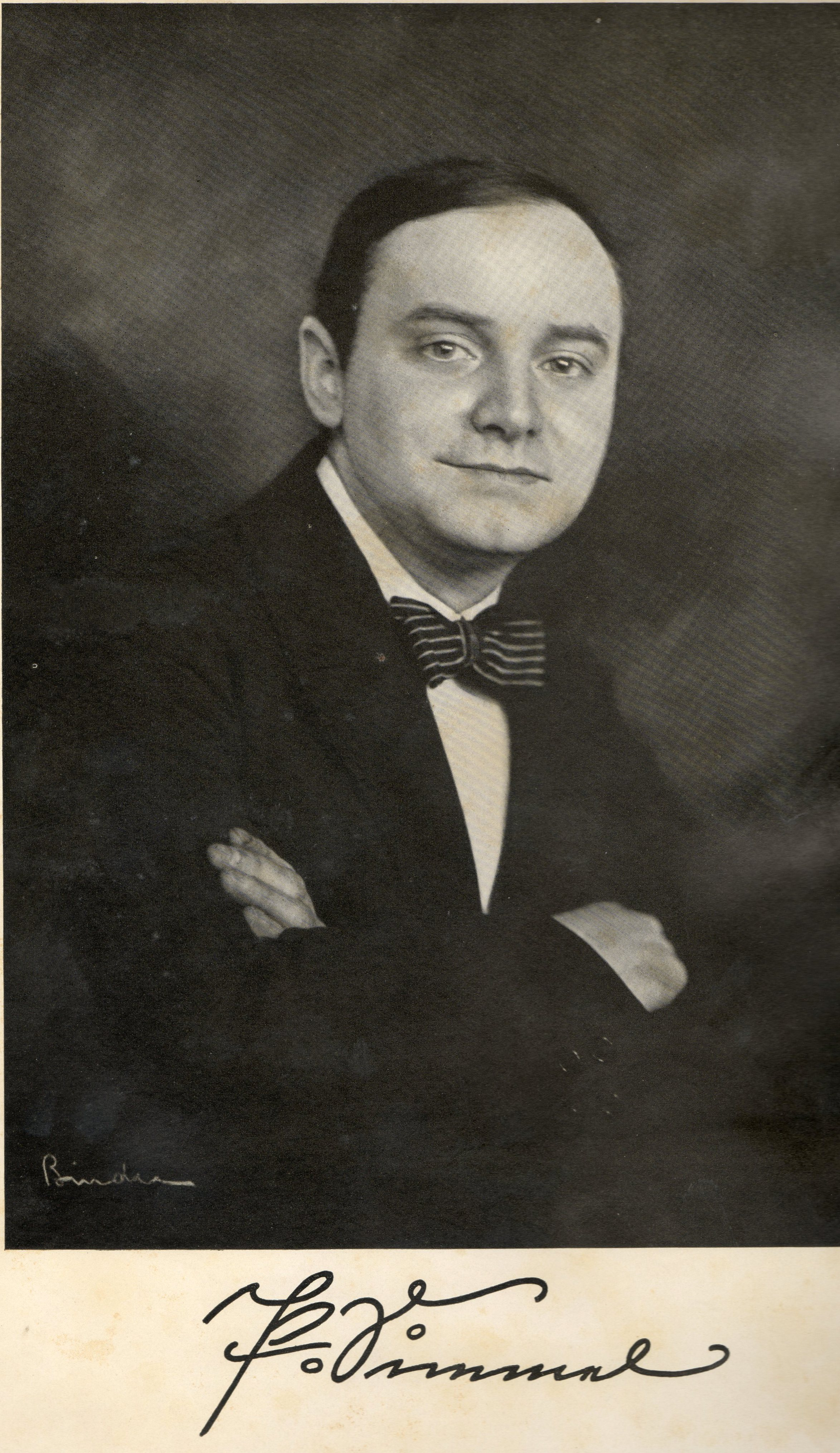 Porträt des Humoristen Paul Simmel